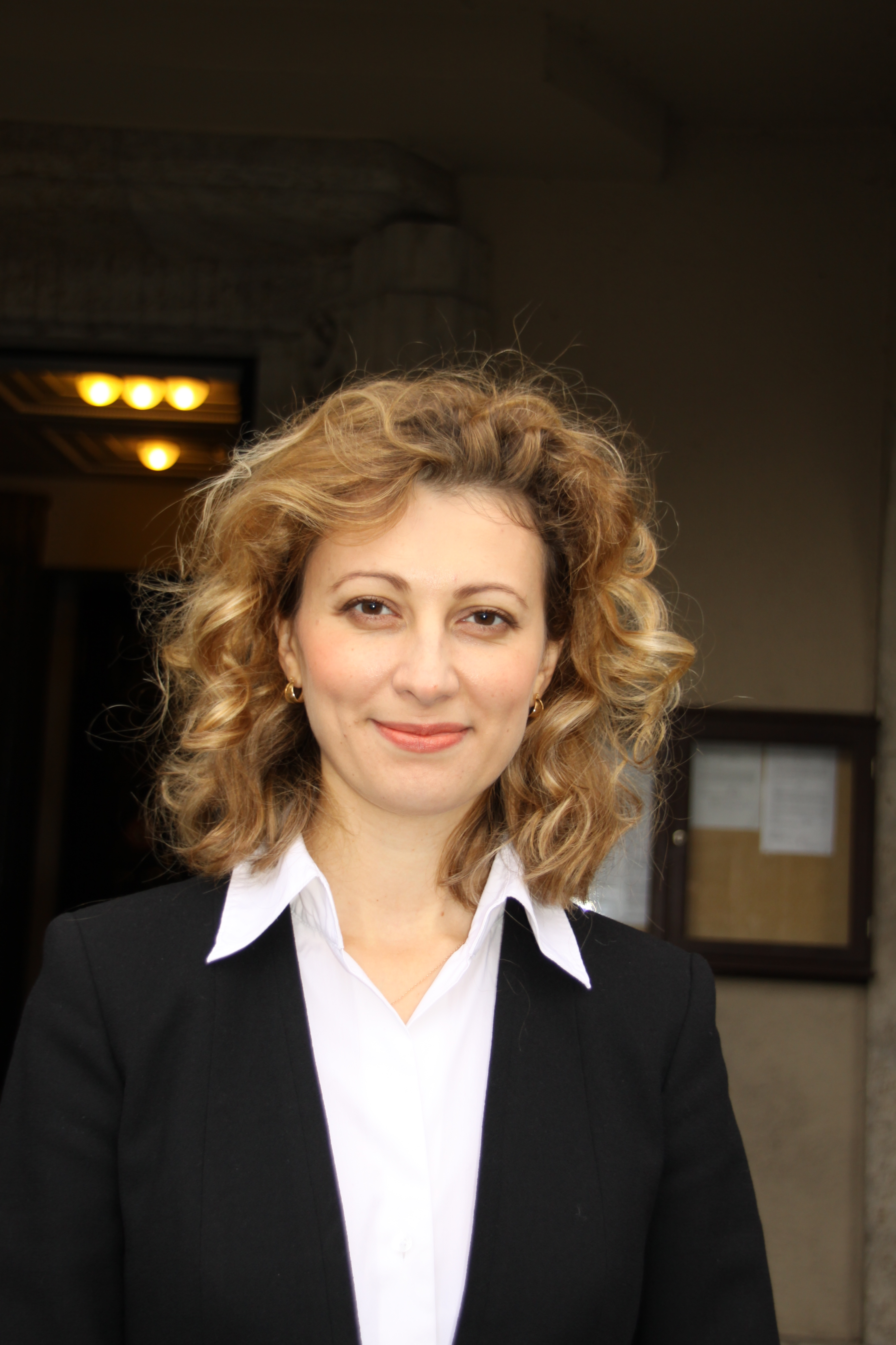 Rabbinerin Alina Treiger